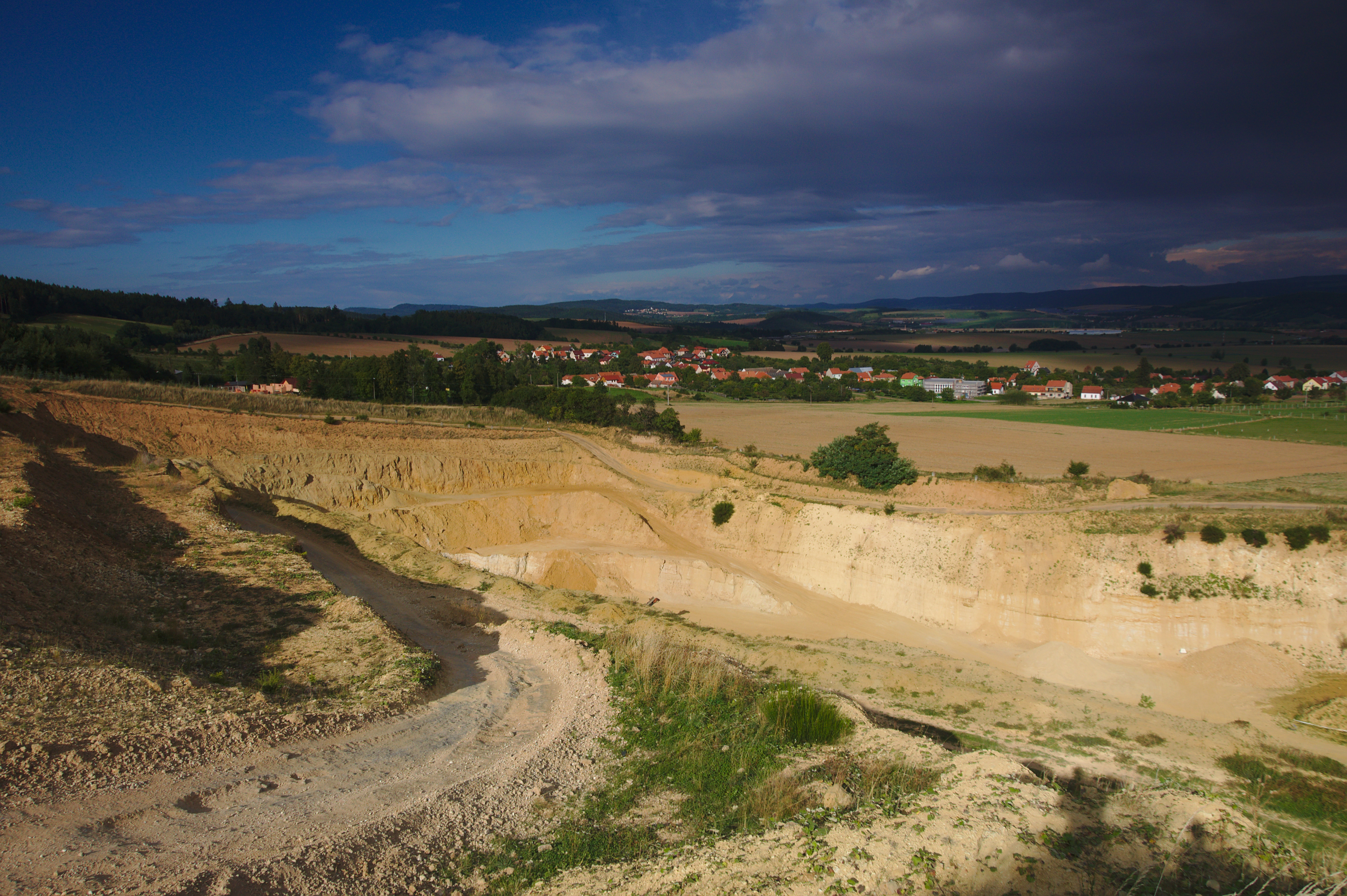 Pohled na obec od jihu, Voděrady, okres Blansko